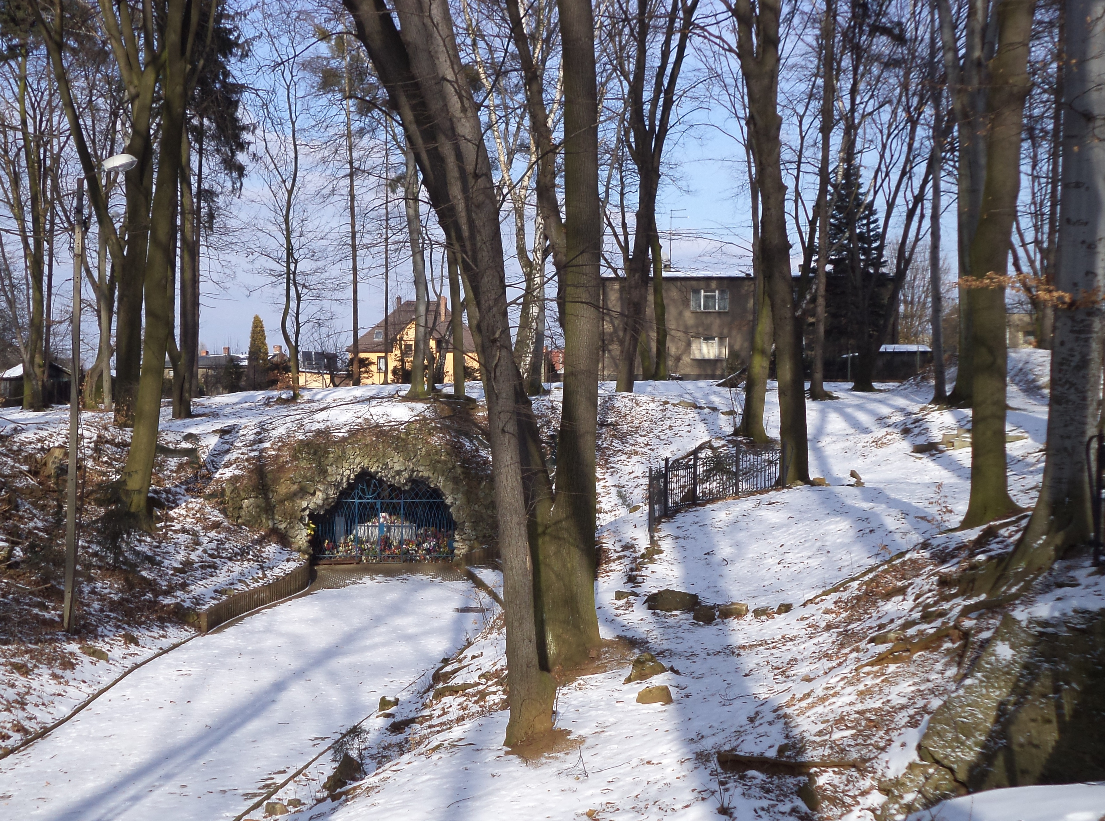 Park Ojców Kamilianów w Tarnowskich Górach - zimą